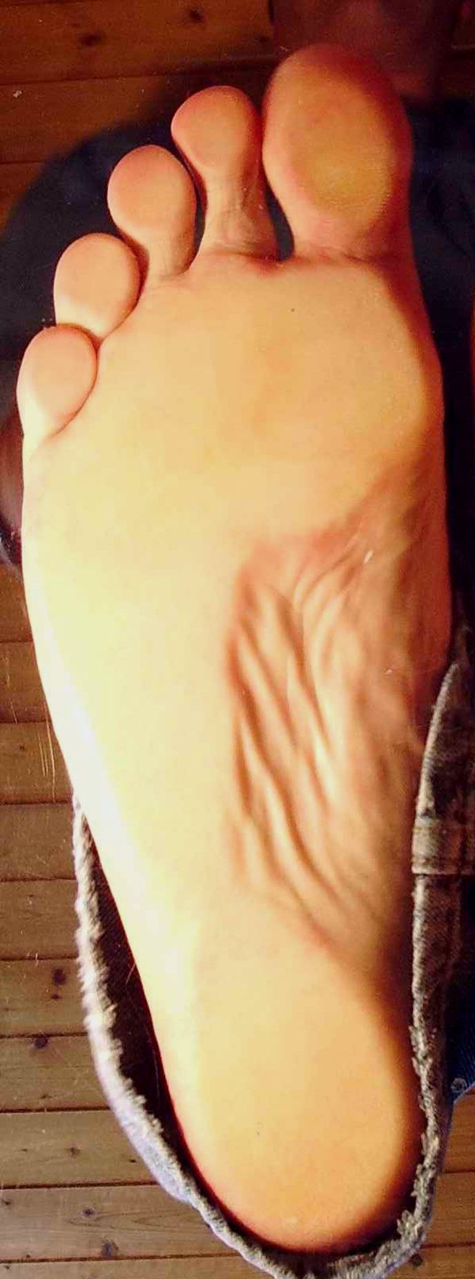 Senkfuß unbelastet